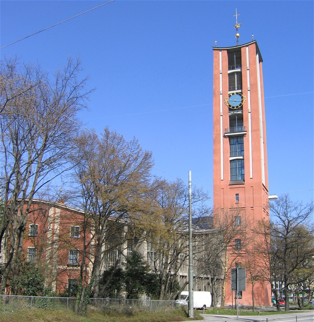 St. Matthäus München